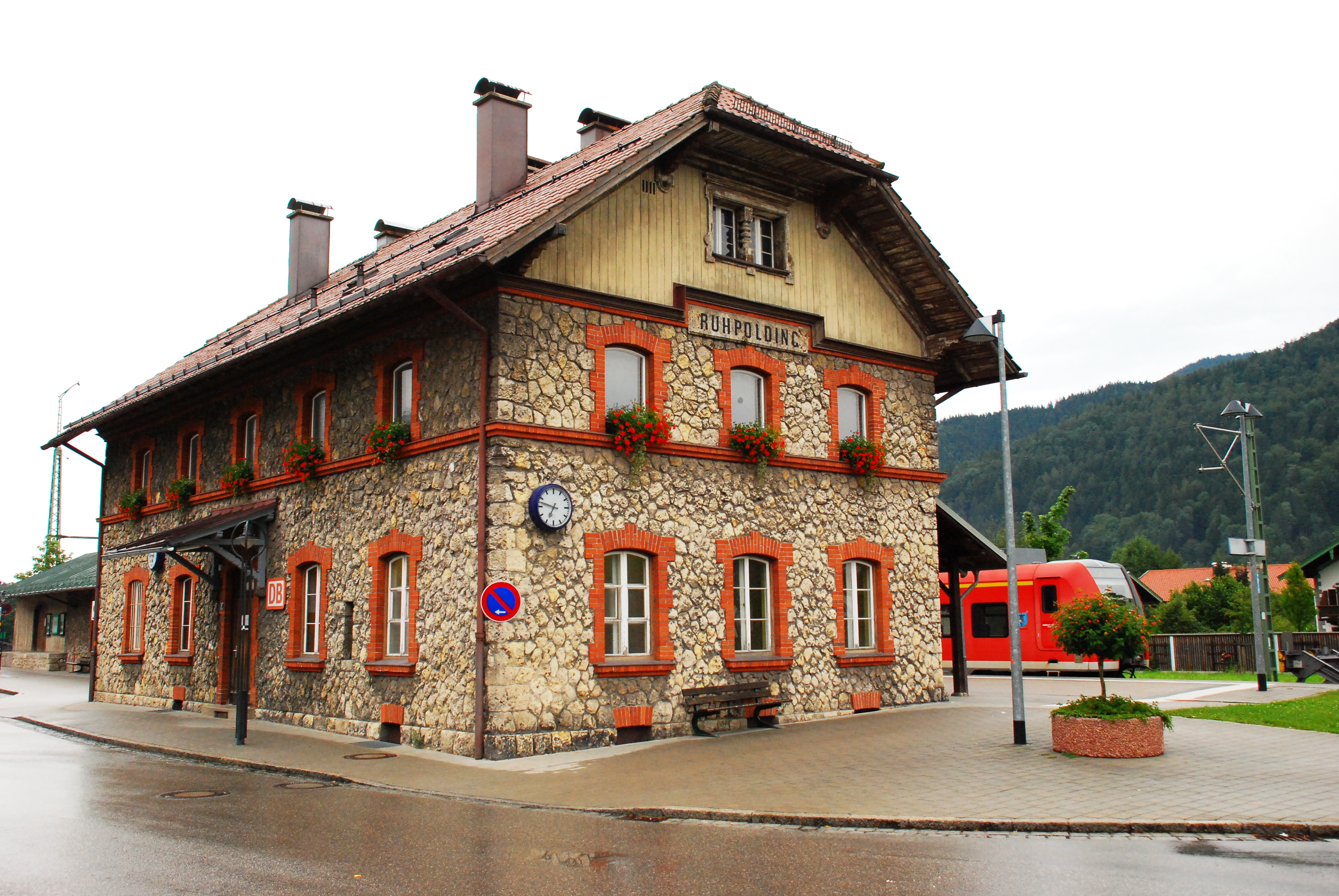 Bahnhof Ruhpolding (Südwestfront) in der Bahnhofstraße 8 in Ruhpolding, Landkreis Traunstein, Regierungsbezirk Oberbayern, Bayern. In der Bayerischen Denkmalliste unter Aktennummer D-1-89-140-149 als Baudenkmal aufgeführt. Laut Denkmalliste als Endstation der Lokalbahn Traunstein-Ruhpolding um 1895 erbaut.